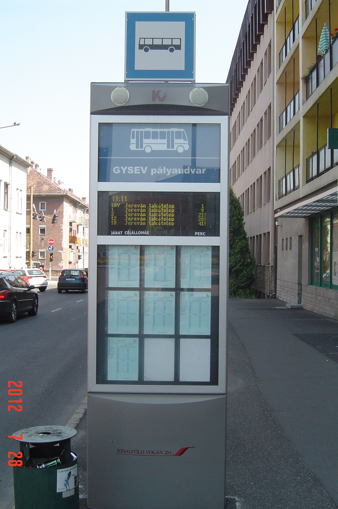 Megállóhelyi információs oszlop Sopronban